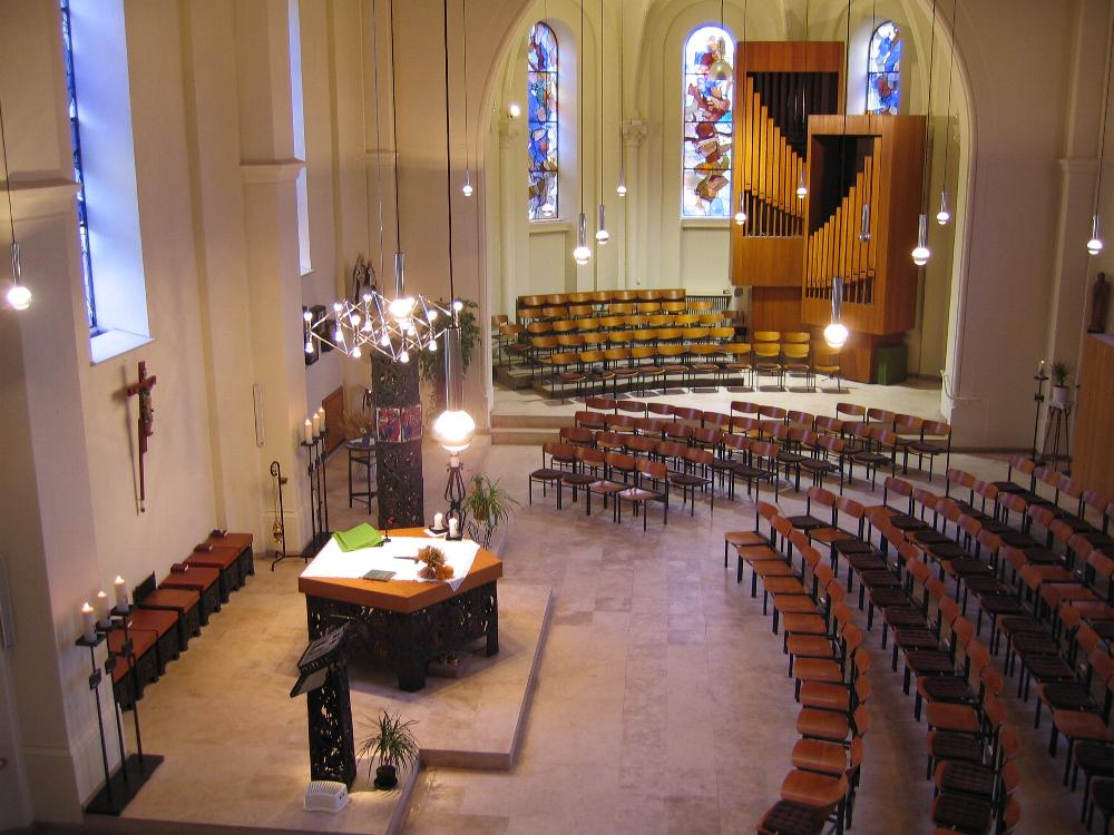 Di Bieleser Kierch vu bannen. Photo vum Pear 12:15, 4 September 2006 (UTC) 03.09.2006. Bieles Kategorie:Gemeng Suessem